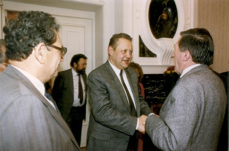 ADN-ZB/Reiche/31.1.89 Frankreich : SED-Delegation Eine Delegation des ZK der SED unter Leitung von Günter Schabowski (Mitte), Mitglied des Politbüros und Sekretär des ZK der SED, weilte vom 21. - 26.11.88 zu einem Besuch in Paris. Während eines Essens in der DDR-Botschaft kam es zu einer freundschaftlichen Begegnung mit Andre Lajoinie (r.), Mitglied des Politbüros des ZK der FKP, und Jacques Denis (l.), Mitglied des ZK der FKP.